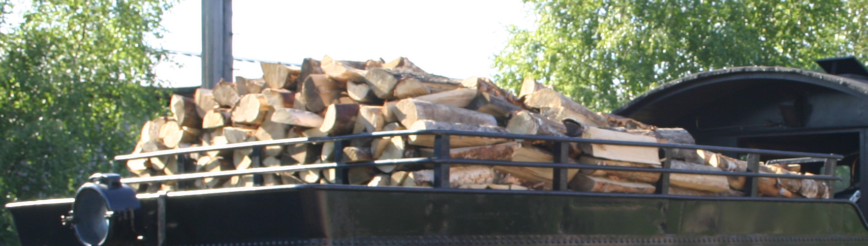 Halkohäkki LWR6-höyryveturissa